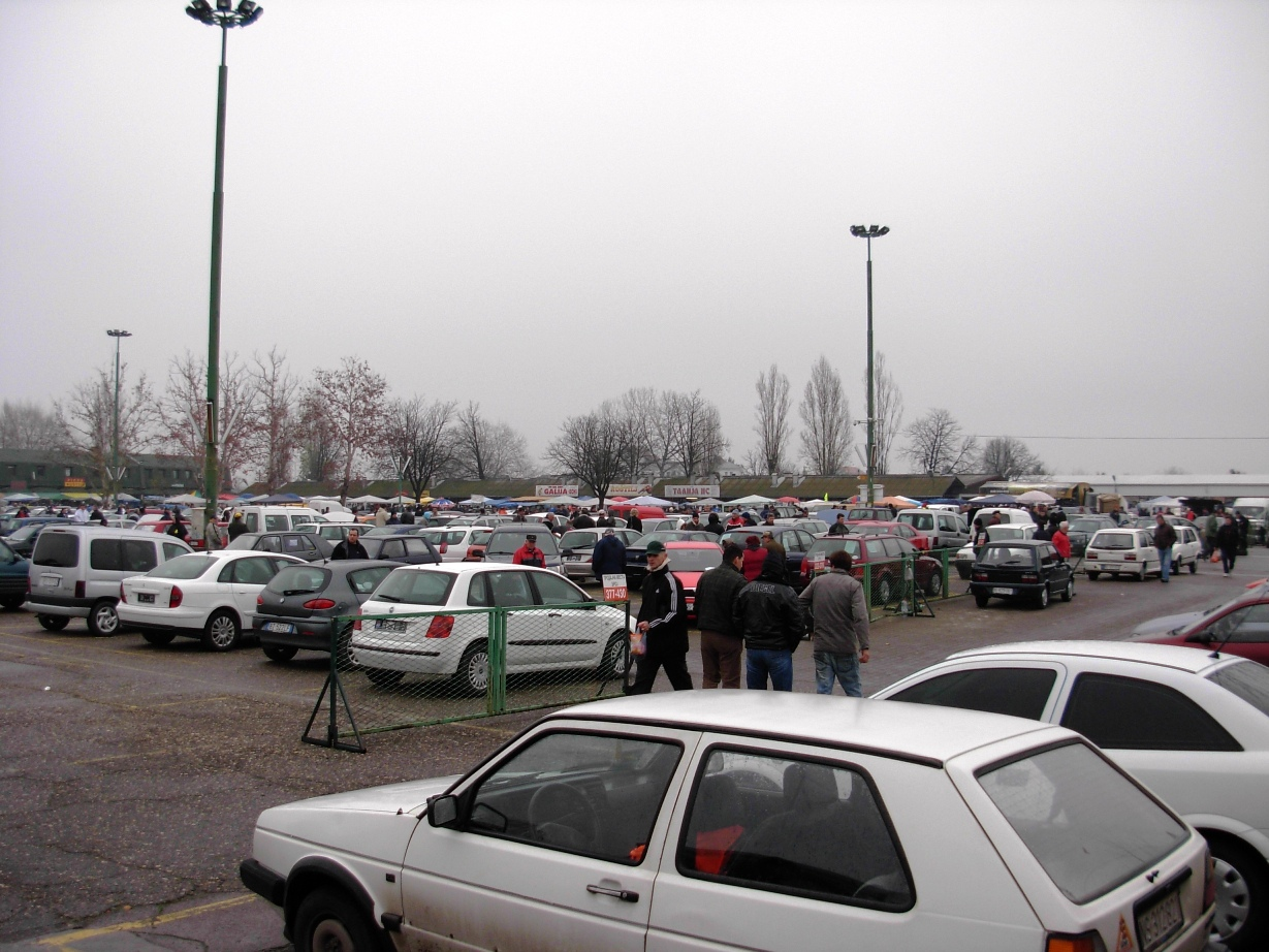 Najlon pijaca u Novom Sadu. Deo gde se prodaju automobili.